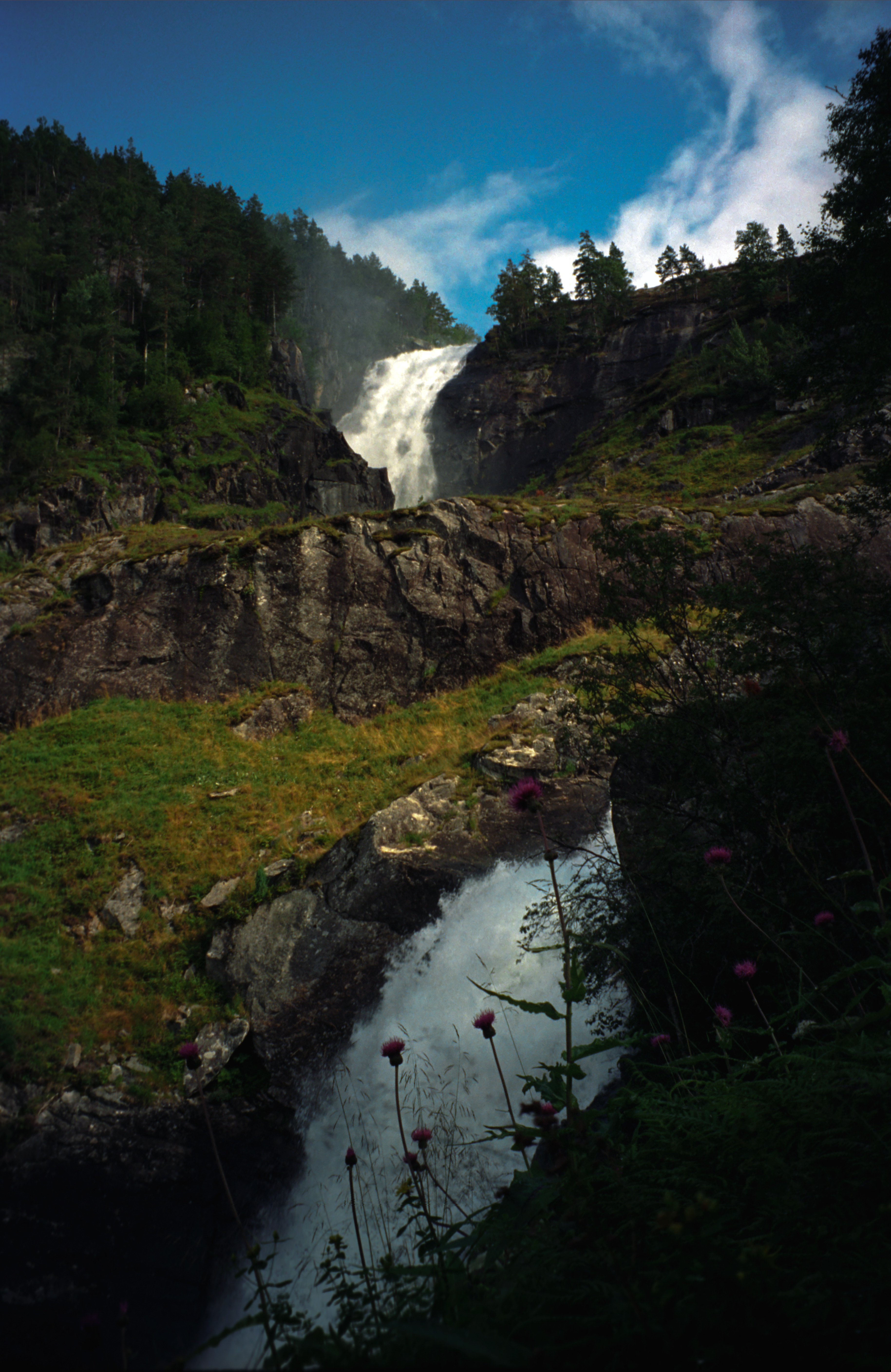 Wodospad Låtefossen